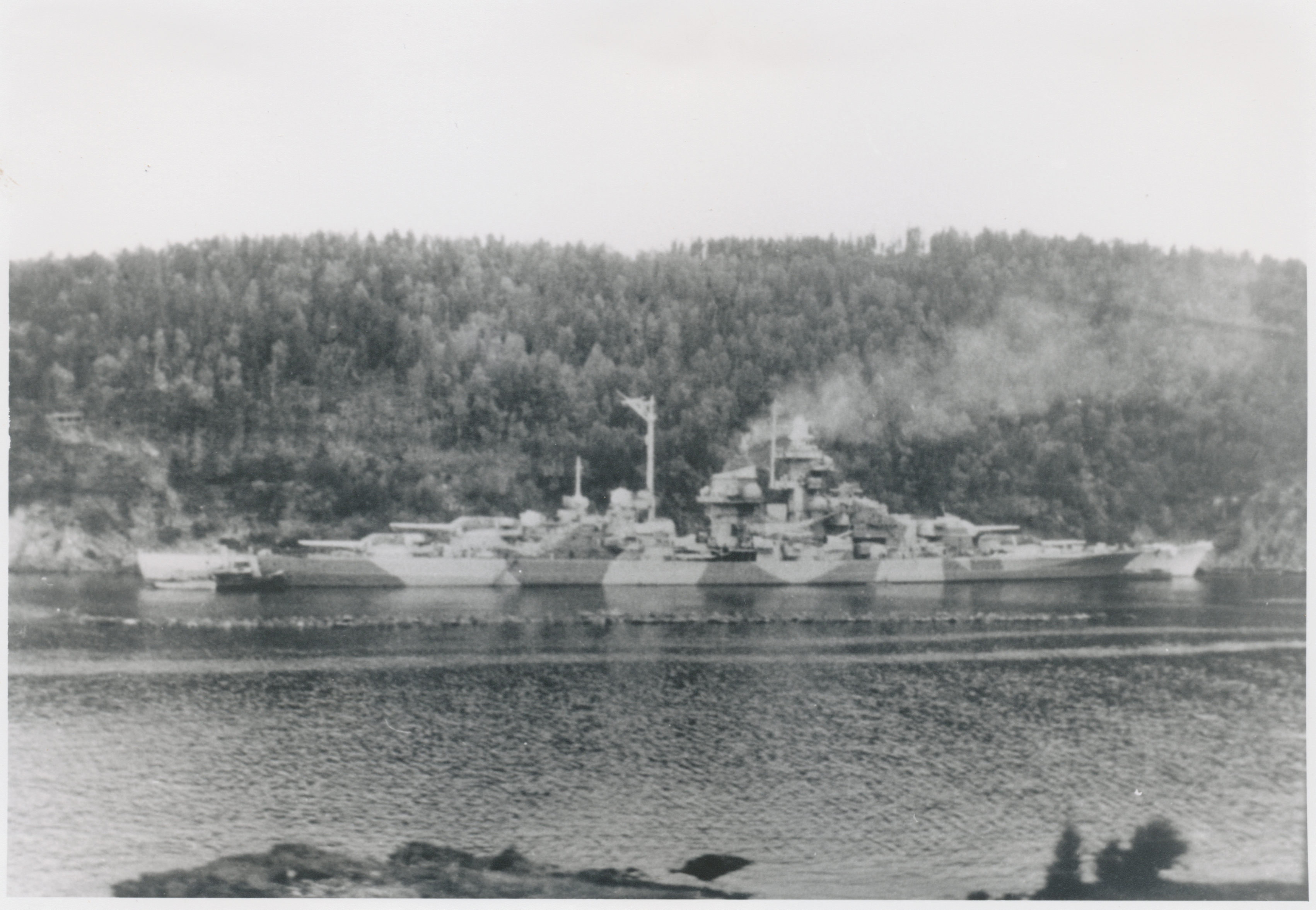 Det tyske slagskipet "Tirpitz" mens det lå i Fættenfjorden i Åsen i 1942. Fotograf / Photographer: Ukjent Fotoeier / Photo owner: Åsen Museum og Historielag Digitalisering / Digitizing: Arne Langås Foto-ID / Photo ID: 001-0993 Har du utfyllende opplysninger? Legg gjerne igjen en kommentar nedenfor eller send e-post til . | Do you have additional information? Please leave a comment or send an e-mail to .